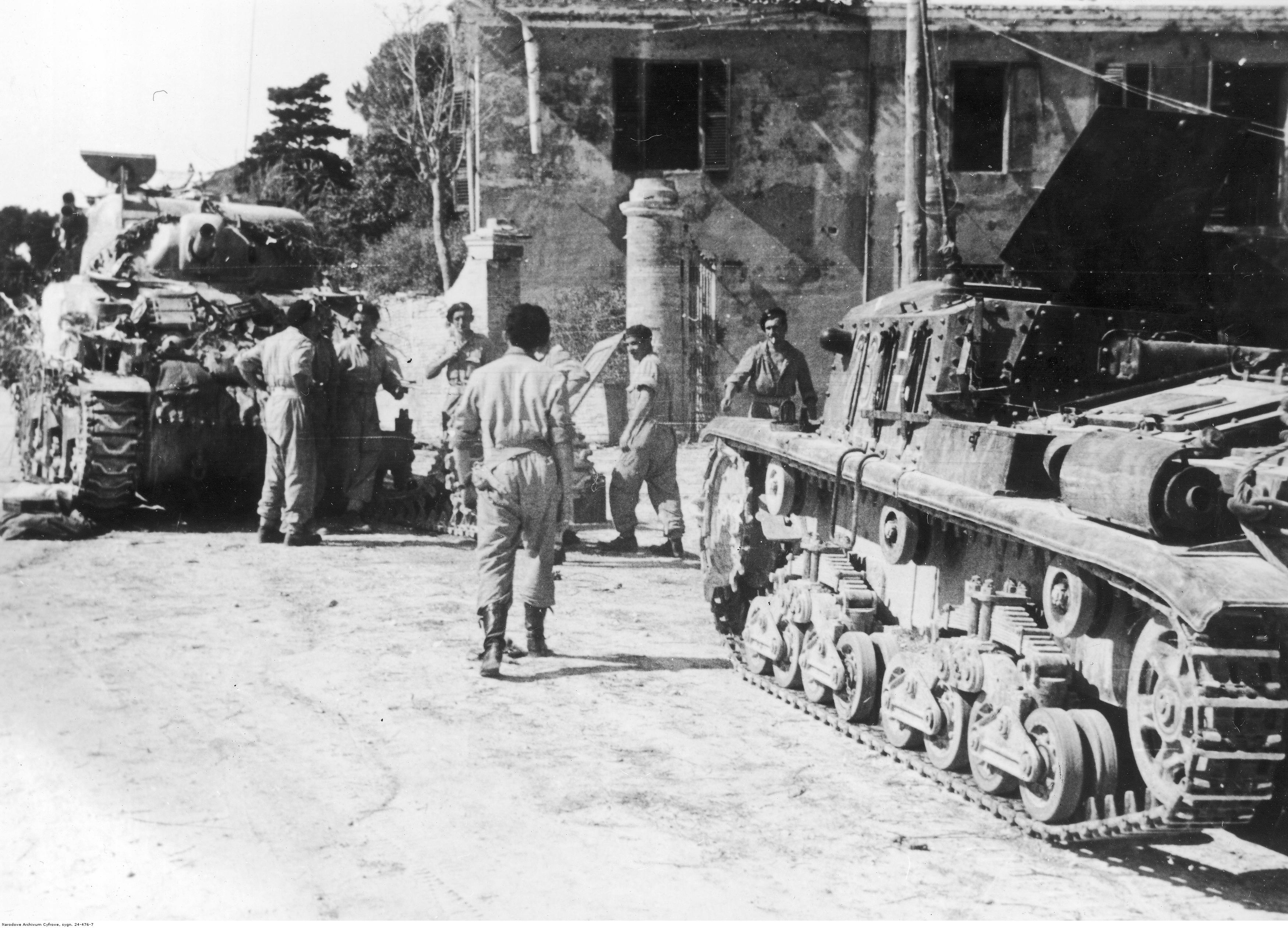 Przygotowania żołnierzy 2 Korpusu Polskiego do zdobycia Ankony. Uszkodzony czołg dowódcy 4 Pułku Pancernego "Skorpion" płk. Stanisława Glińskiego obok włoskiego działa samobieżnego Semovente da 75/18 (używanego przez Niemców pod nazwą: Sturmgeschütz M 42 mit 75/18 850). Archiwum Fotograficzne Tadeusza Szumańskiego. Sygnatura: 24-476-7